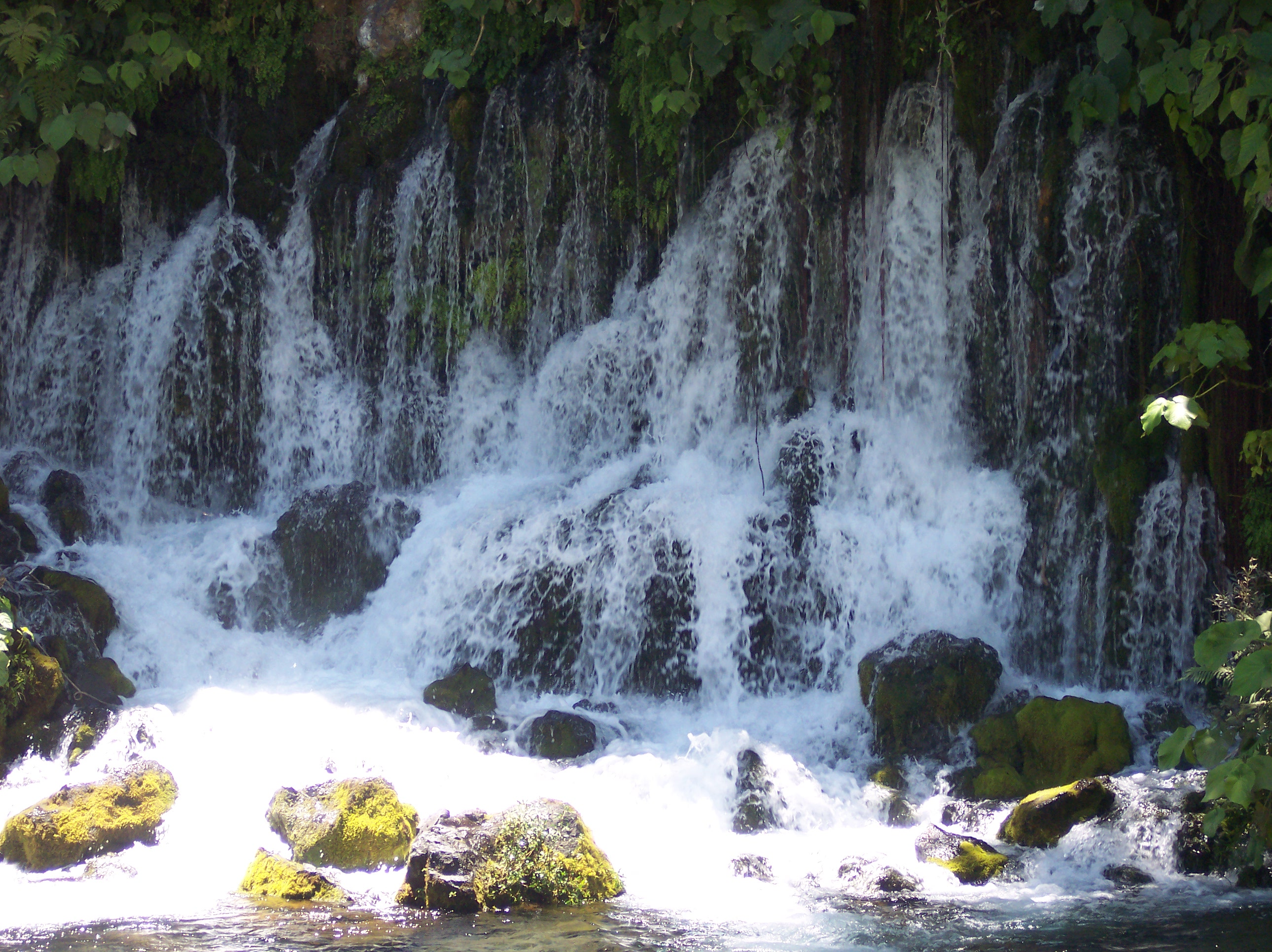 El Descabezadero, Actopan River. This is a place where the most part of the river get out from subwater in a natural rock wall. This is a tourist place. SPANISH: El Descabezadero, Río Actopan. En esta parte la mayor parte del río emerge de una pared de roca natural proveniente de aguas subterraneas. Es un lugar turístico. Municipality of Actopan, State of Veracruz, Mexico. SPANISH: Municipio de Actopan, Estado de Veracruz, Mexico.